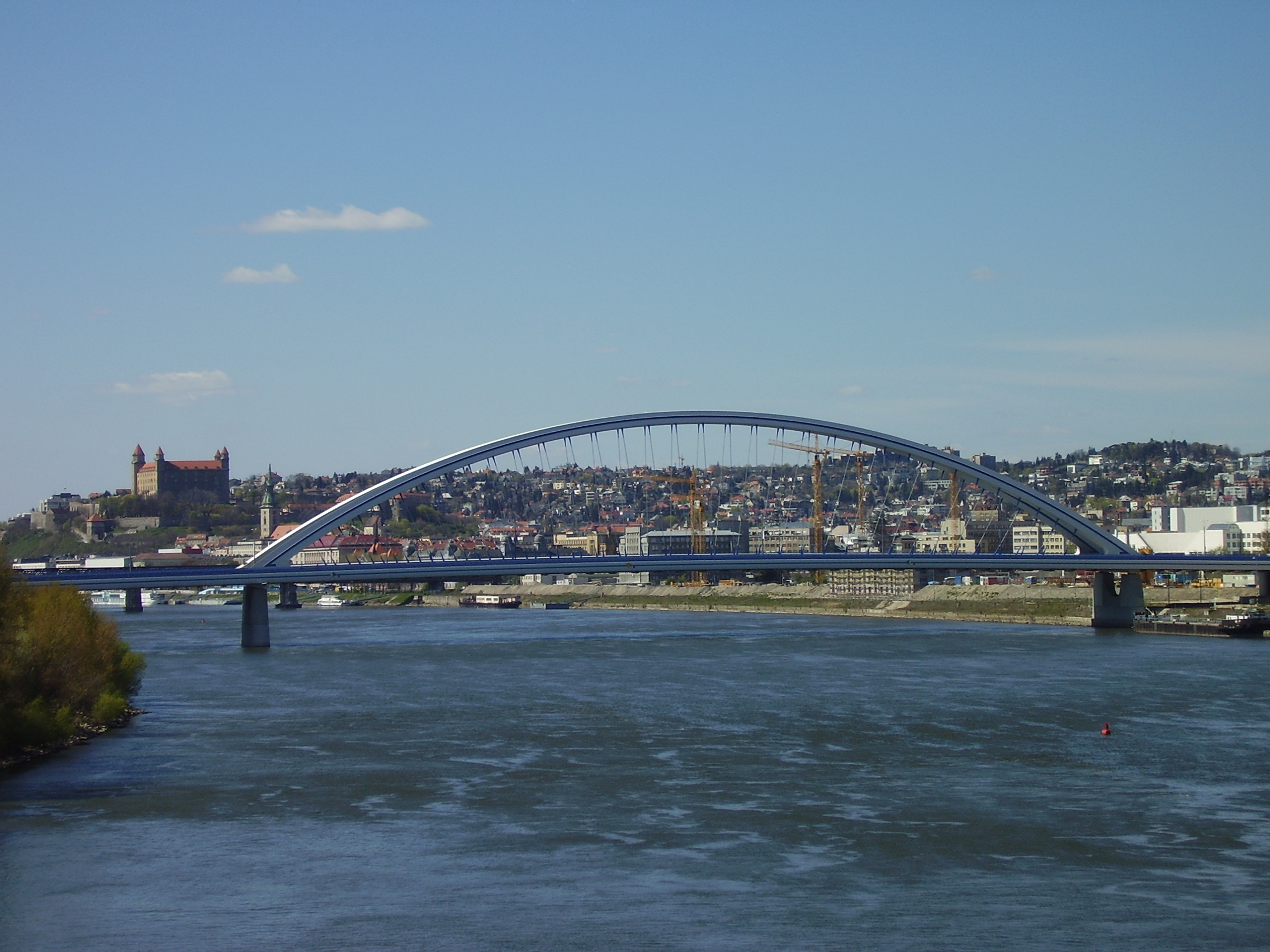 Bratislava